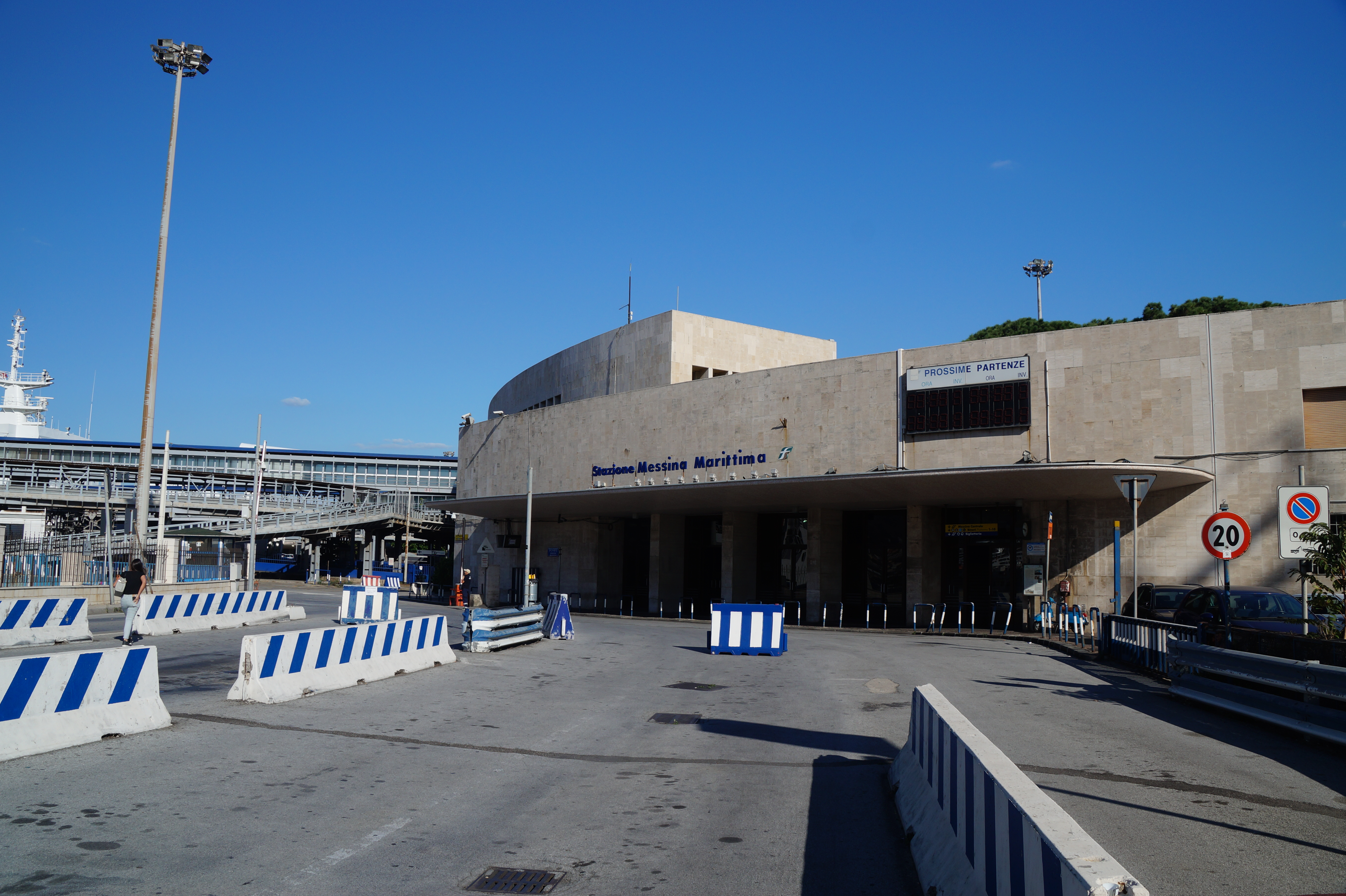 Bahnhofsgebäude Haltepunkt Messina Marittima